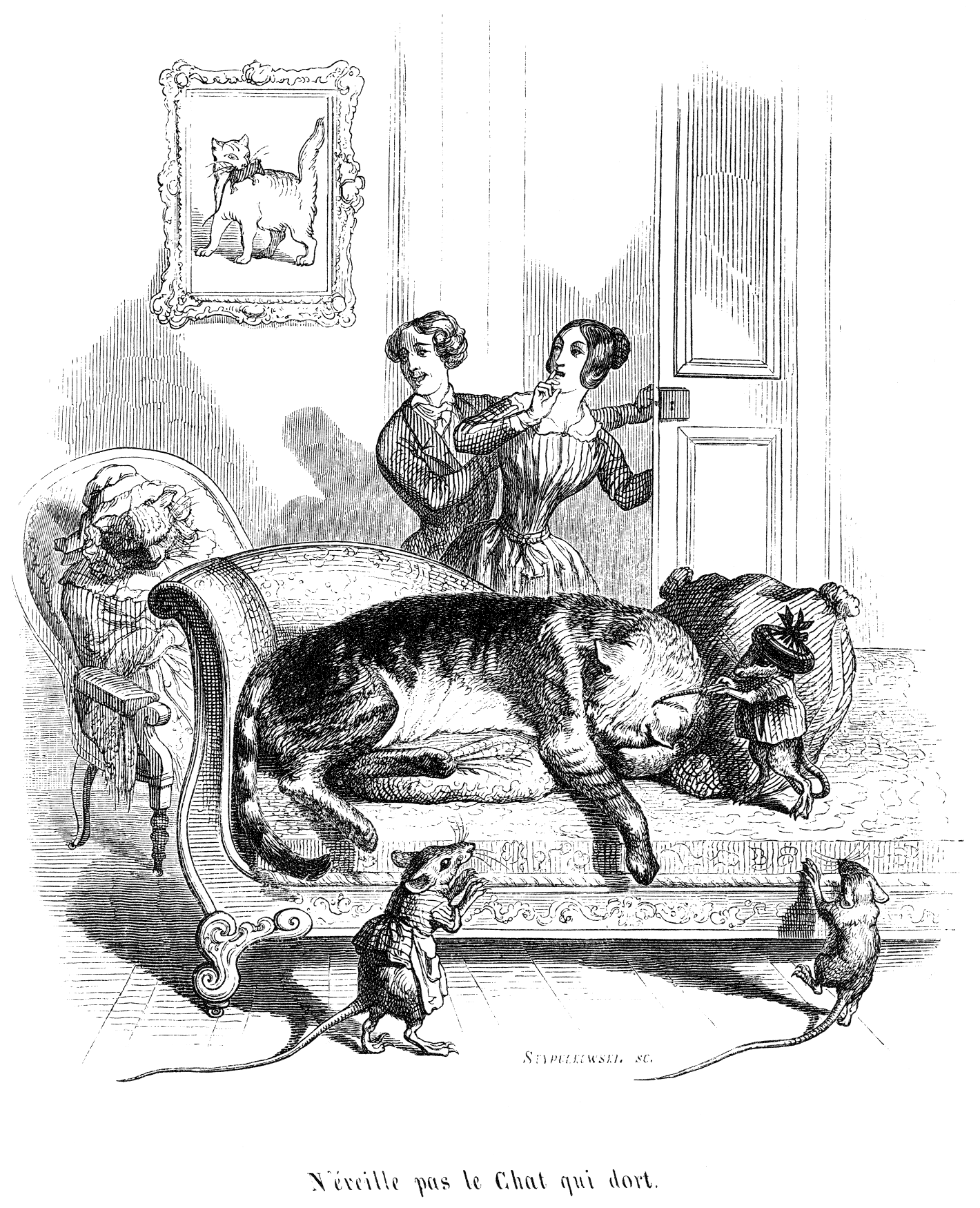 Grandville : Cent Proverbes